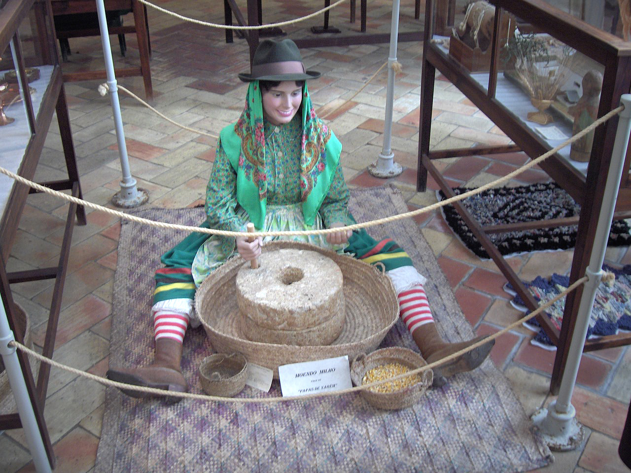 Regional museum; Lagos, Portugal